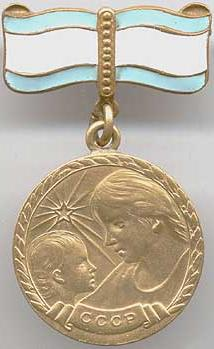 «Медаль материнства» II степени из бронзы